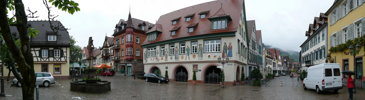 Haslach (Kinzigtal): Blick auf das Rathaus.